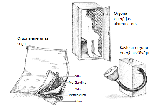 Orgonu enerģijas veidošanās